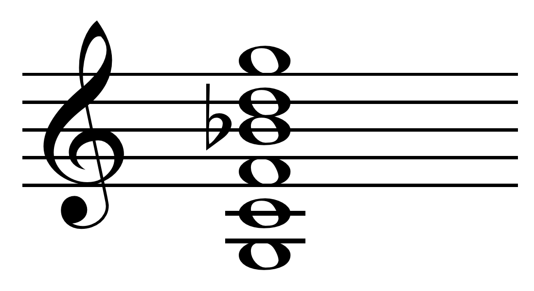 Terz or G tuning.